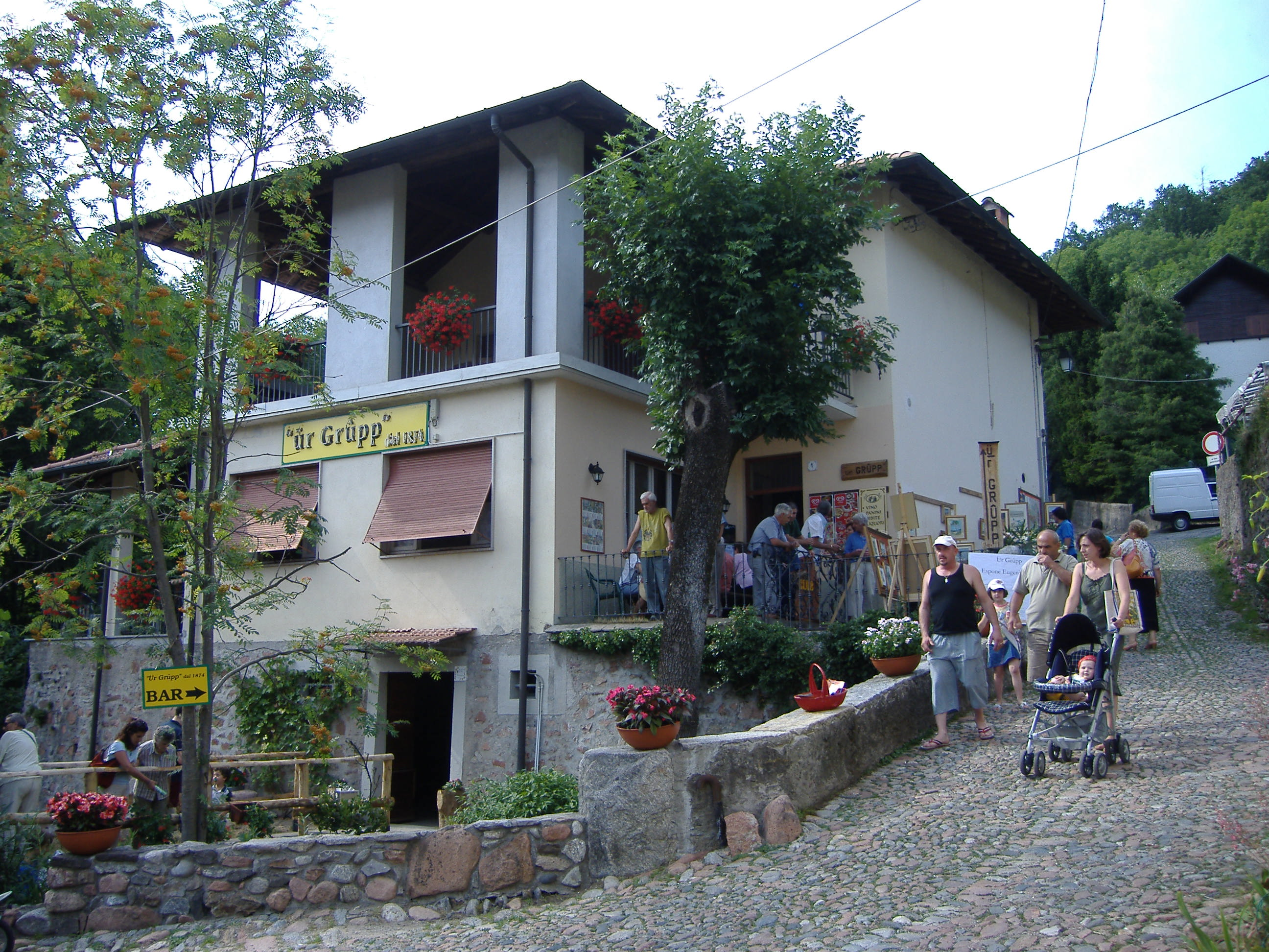 Lo storico circolo paesano di Brinzio, Ur Grupp